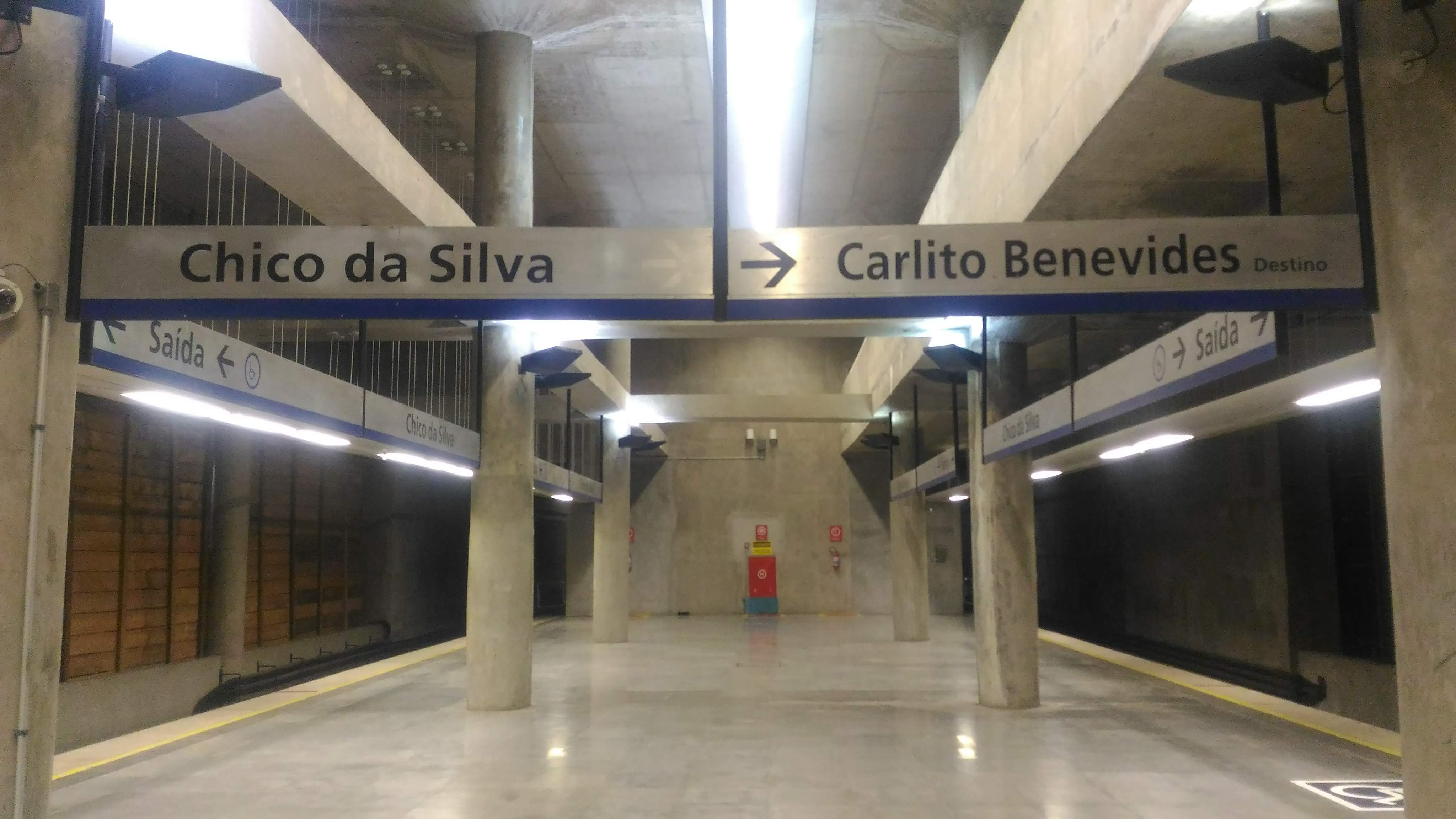 Estação Central do metrô de Fortaleza, Chico da Silva.